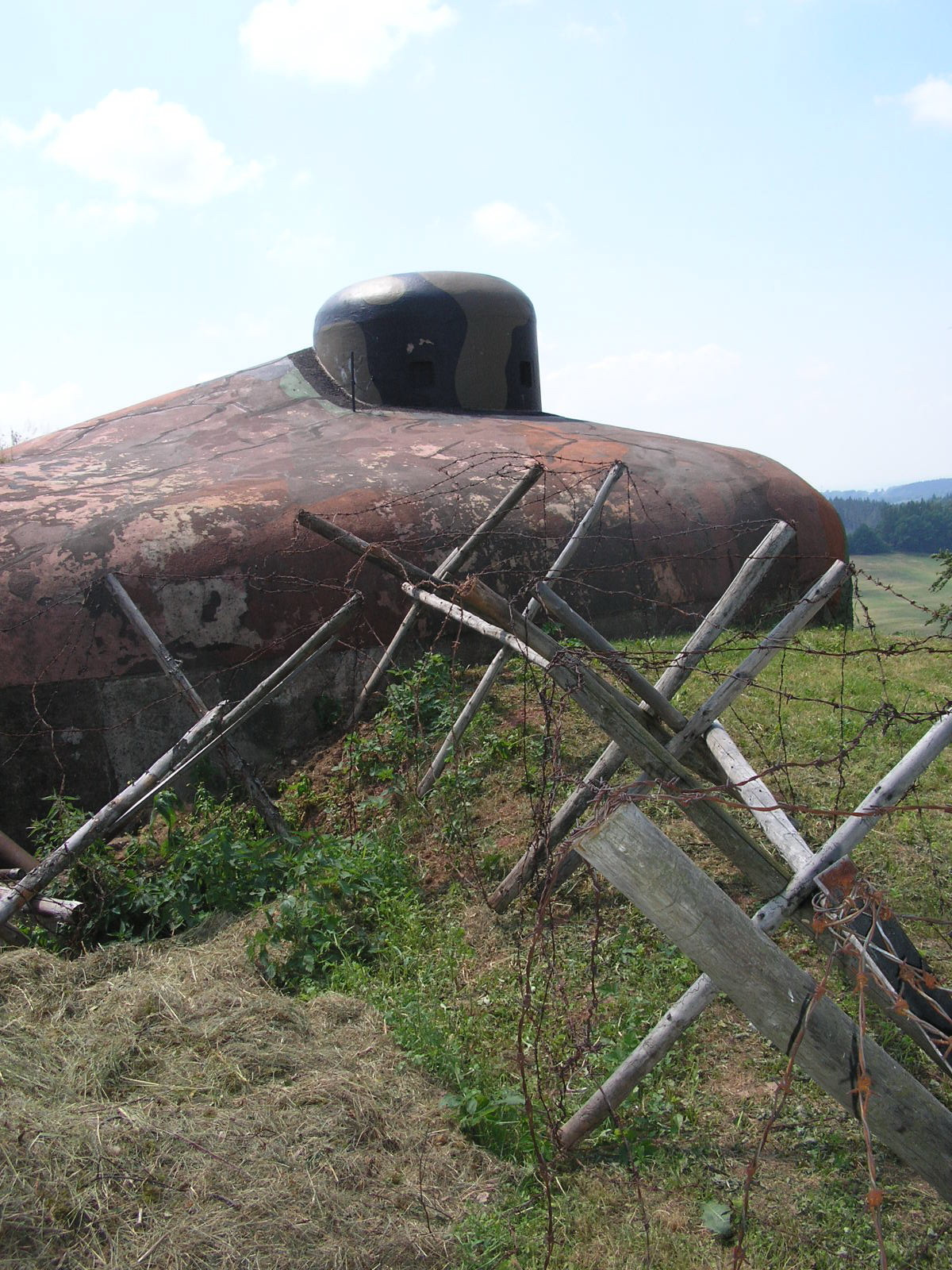 N-S 82 Brezinka